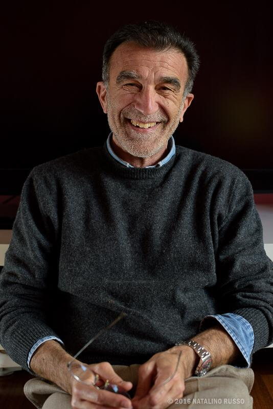 Sergio